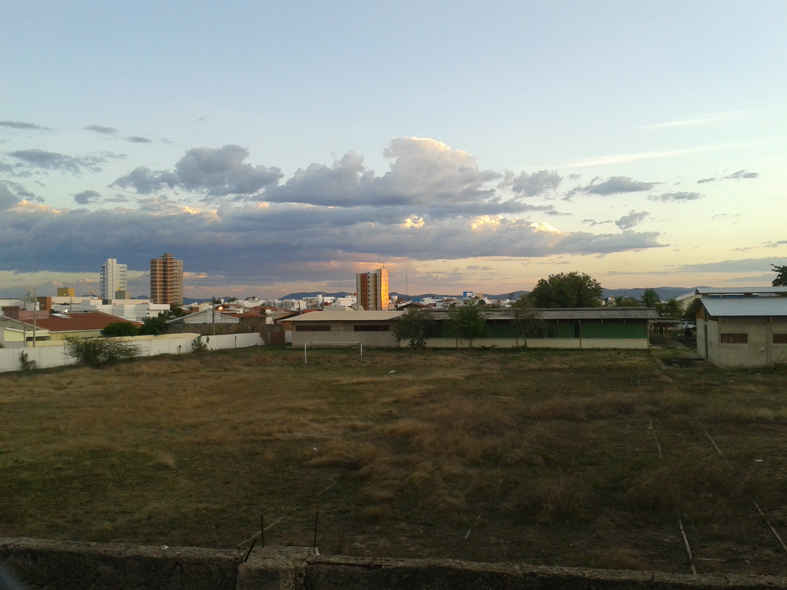 sousa , paraiba